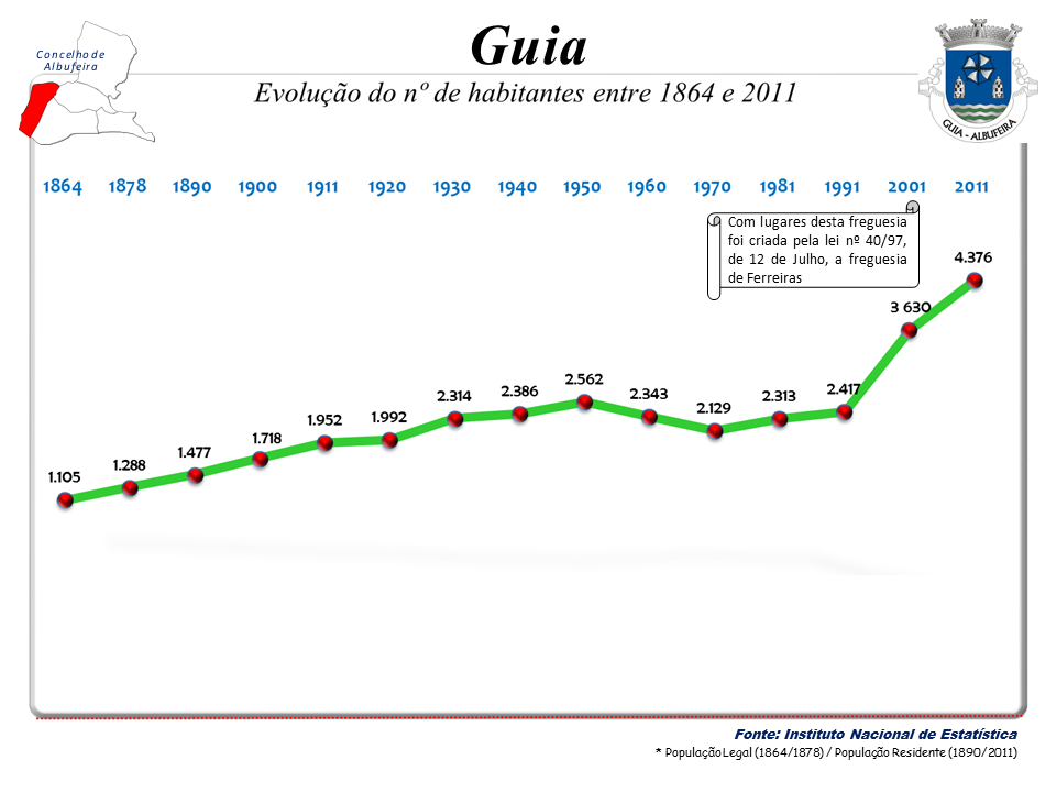 Censos 1864/2011